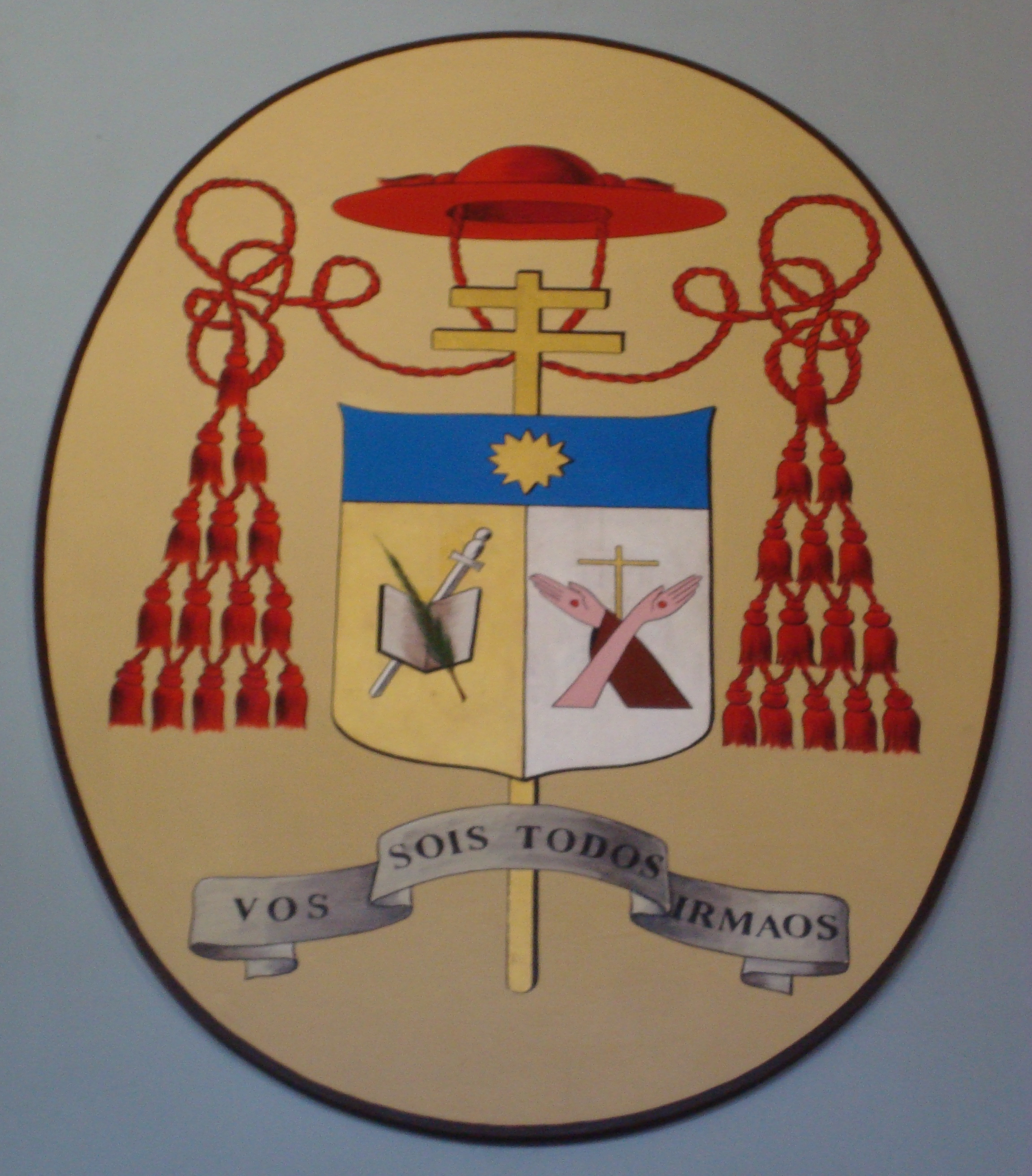 Titre cardinalice du cardinal Claudio Hummes